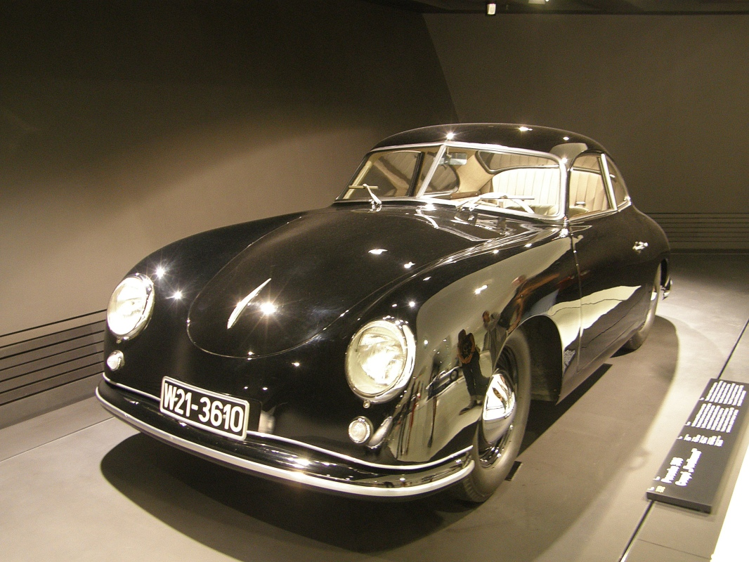 Bilder aus dem Porsche Museum Native namePorsche-MuseumLocationStuttgartCoordinates48° 50′ 07″ N, 9° 09′ 06″ E Established1976 (old museum) 2009 (new museum)Web page control : Q328623 VIAF: 138511768 GND: 2087859-X SUDOC: 155641123 NKC: ko2015876799 institution QS:P195,Q328623